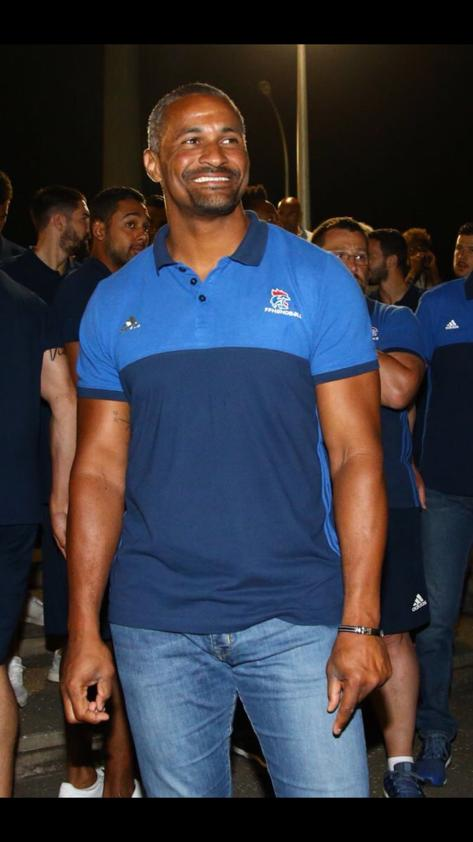 Didier Dinart entraîneur de l'équipe de France, lors de l’inauguration du palais des sports en Guadeloupe.